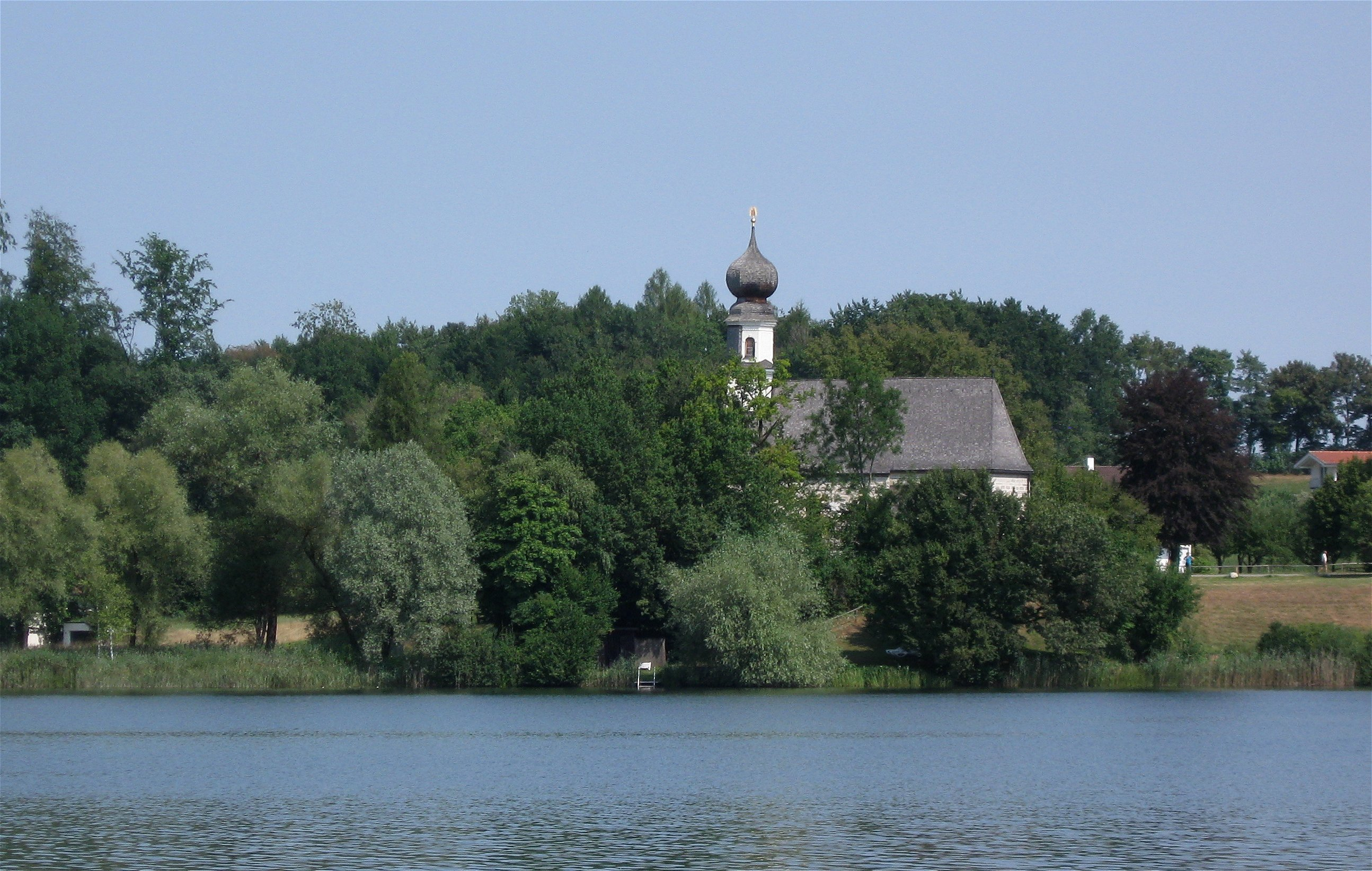 Bräuhausen, Weinbergstraße 59; Kirche St. Maria, spätgotisch, erbaut 1529-33, Dachreiter 18. Jahrhundert; mit Ausstattung; Friedhof mit Ummauerung, nördlich einbezogen Kriegsheimkehrerkapelle, erbaut 1923; mit Ausstattung. Kriegerdenkmal in Form einer Stele, bezeichnet mit dem Jahr 1923; vor der östlichen Friedhofsmauer.